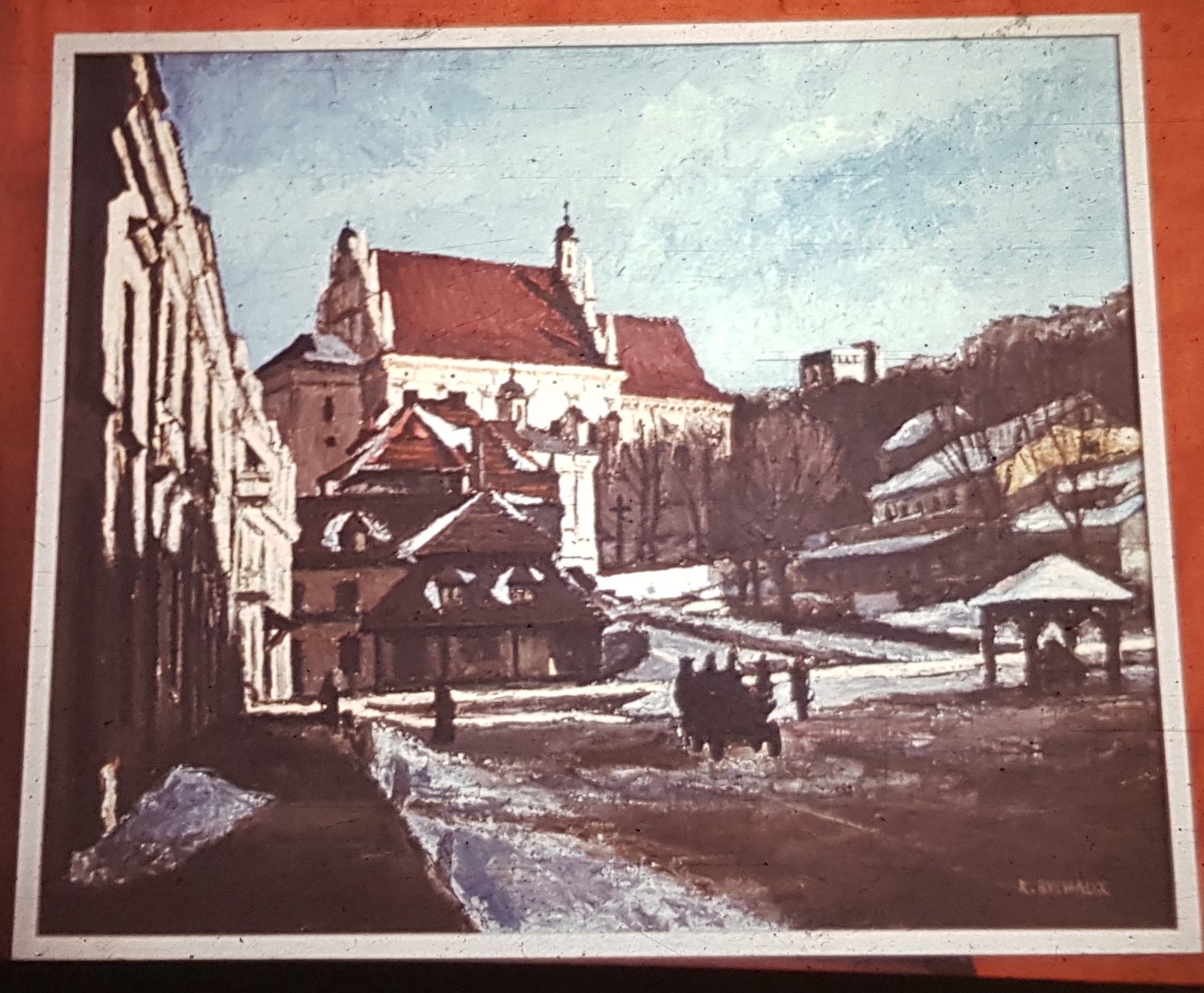 Kazimierz zimą. Obraz autorstwa Rudolfa Buchalika